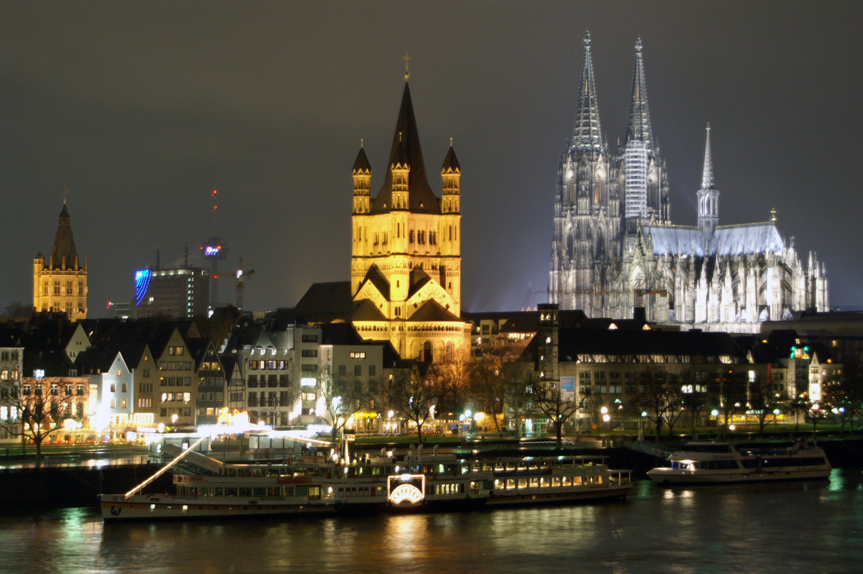 Der Raddampfer Goethe bei Nacht am Anleger Köln im Jahr 2010.